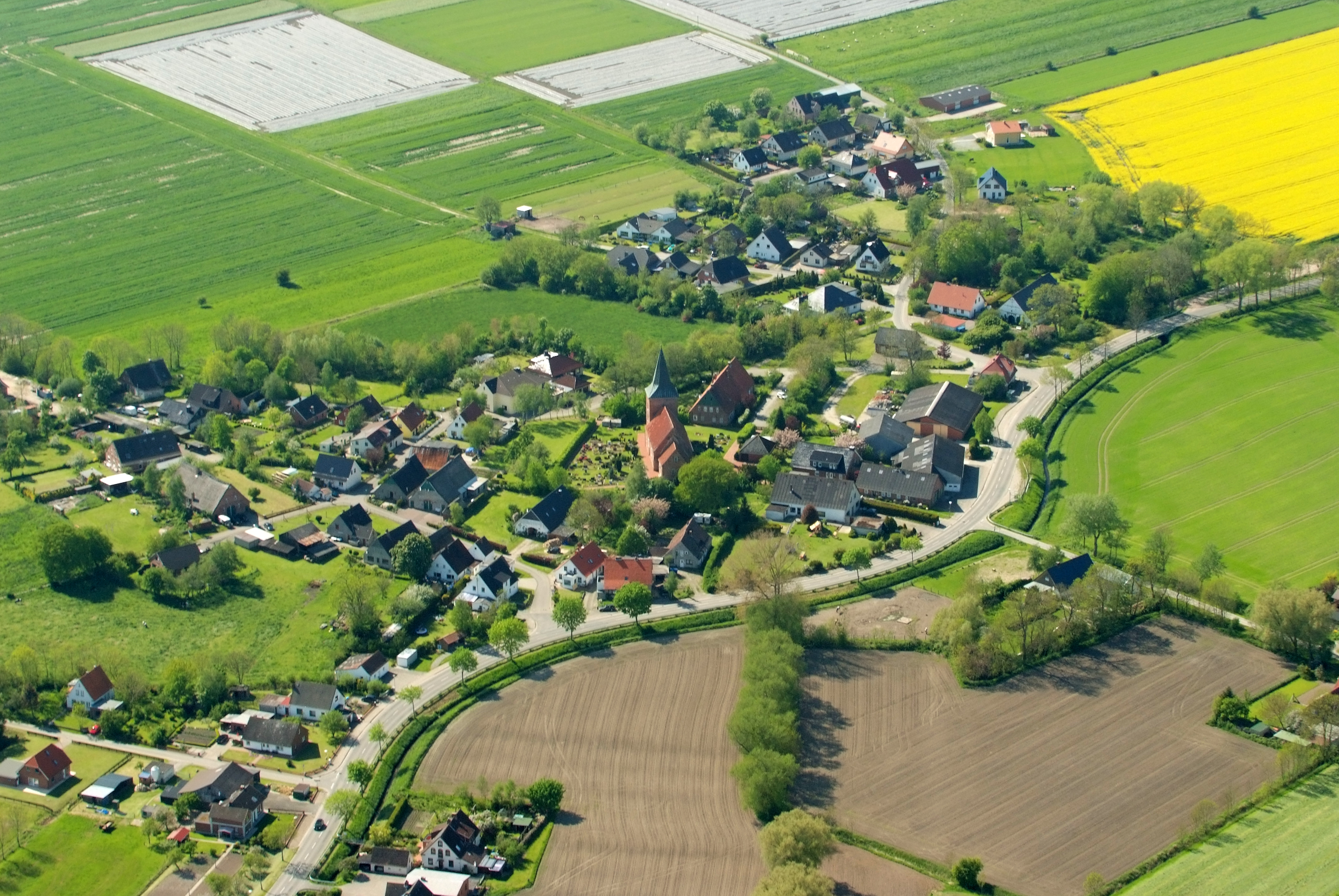 Misselwarden Fotoflug vom Flugplatz Nordholz-Spieka über Bremerhaven, Wilhelmshaven und die Ostfriesischen Inseln bis Borkum